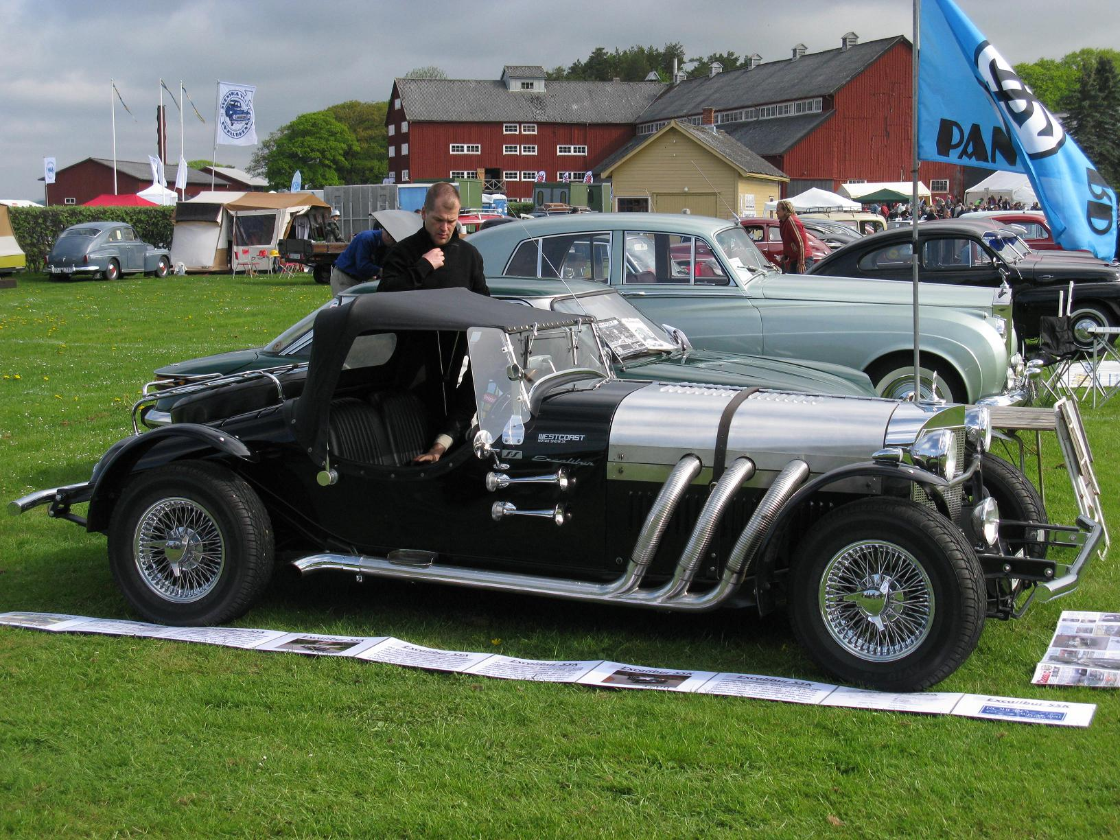 Excalibur SS